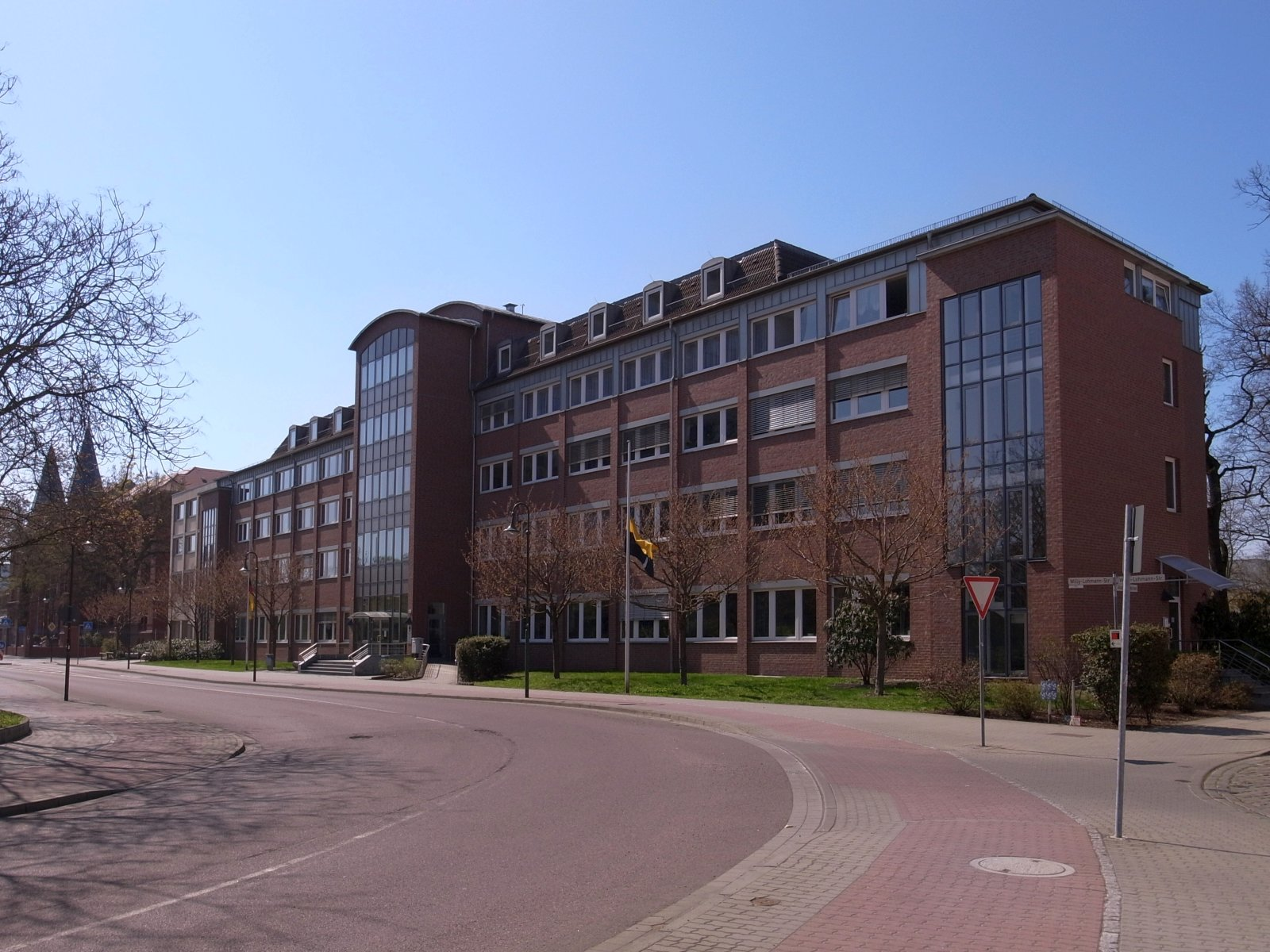 Justizzentrum Dessau-Roßlau, am 21.06.2012 umbenannt in 'Justitzzentrum Anhalt' , Standort: Willy-Lohmann-Str. 29